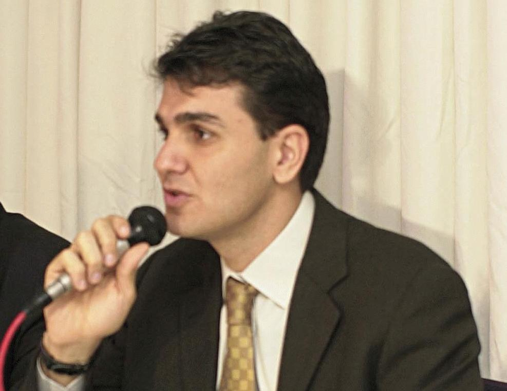 Recorte e inversão de image:Gabriel Chalita e Neroaldo de Azevedo.jpeg